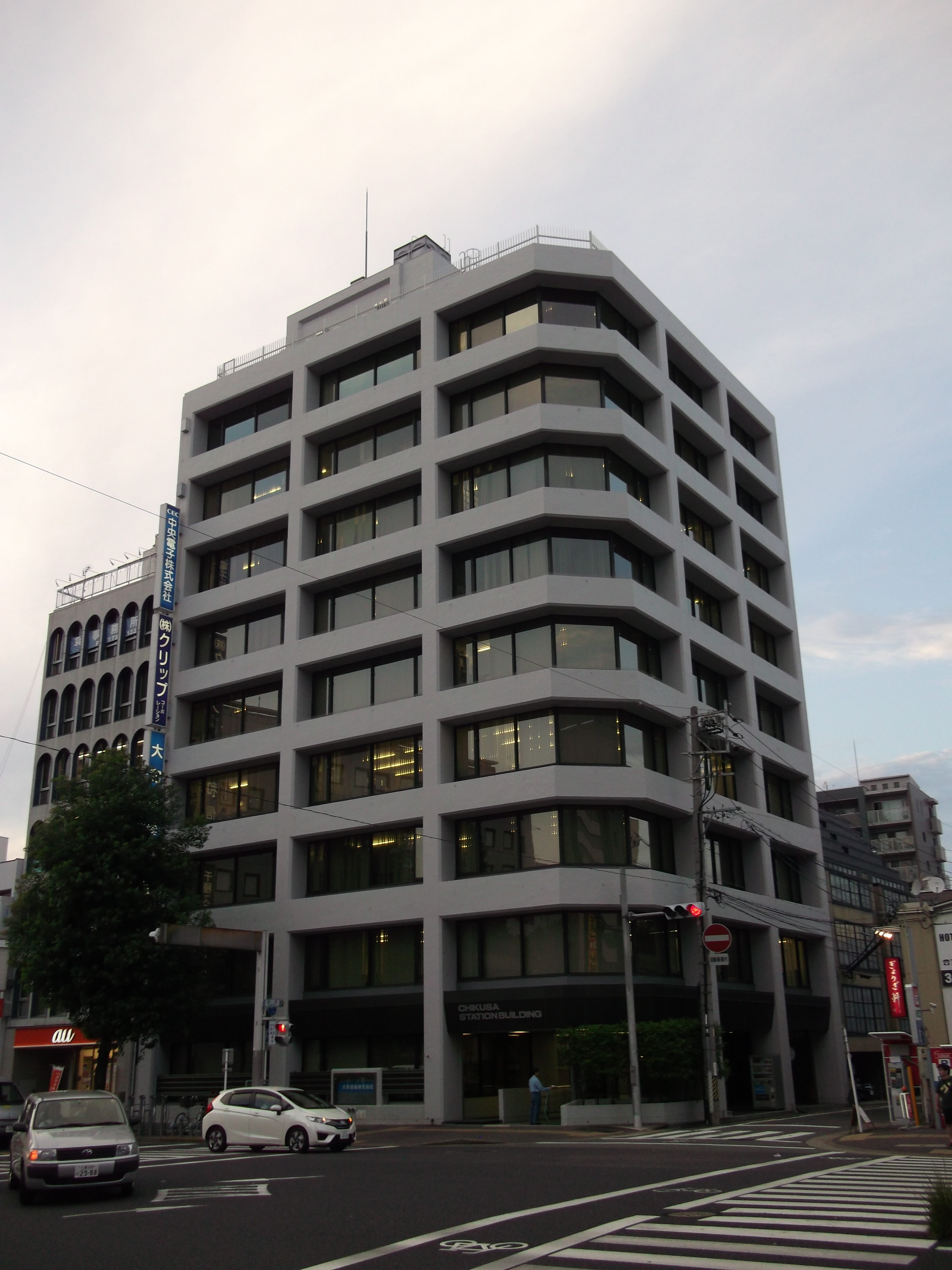 名古屋市千種区の千種ステーションビルを南側公道東側より撮影